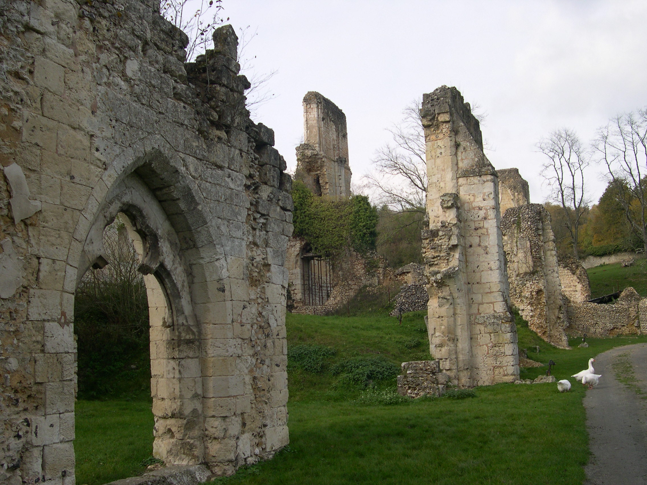 Ancienne abbaye de Mortemer - Lisors - Eure - France - Mérimée PA00099469 .